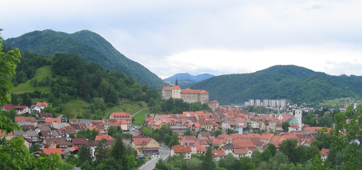 Škofja Loka, Slovenia photo:Ziga 15:27, 5 June 2006 (UTC)